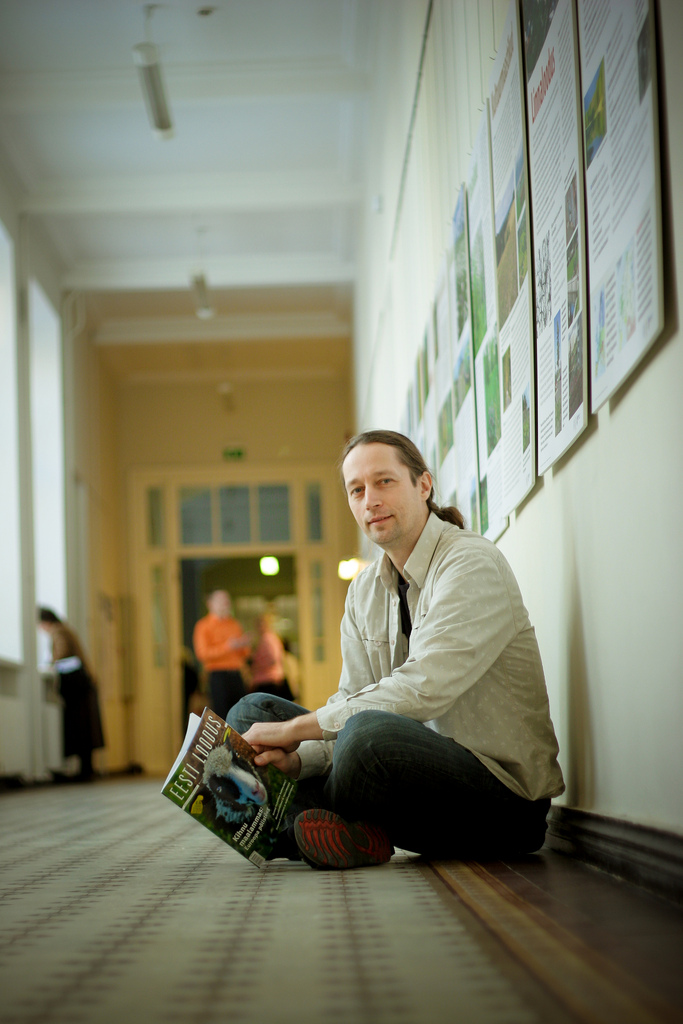 Geneetik Urmas Saarma 2010. aastal.